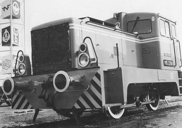 Leipziger Messe, Diesellok V15 2258 (BR V15) Zentralbild Koch-Krueger Me 3.3.63 Leipziger Frühjahrsmesse 1963. Freigelände der Technischen Messe - Schienenfahrzeuge. UBz: Eine Dieselhydraulische Lokomotive, Typ V 18 B, Motorleistung 180 PS, eine Neuentwicklung des VEB Lokomotivbau "Karl Marx" Babelsberg. [Leipziger Messe.- Diesellokomotive V15 2258 (Baureihe V 15)]